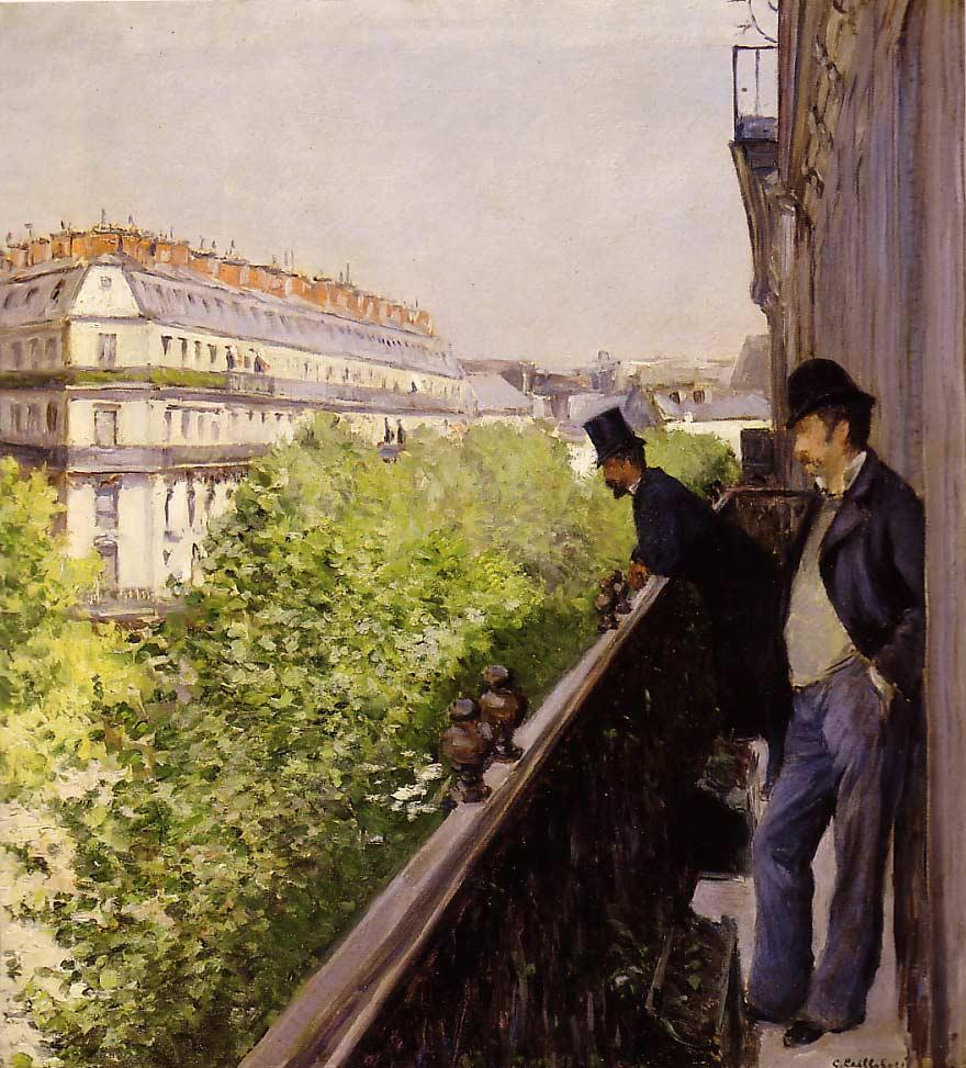 Gustave Caillebotte: Un balcon au 31 Bd Haussmann, domicile du peintre